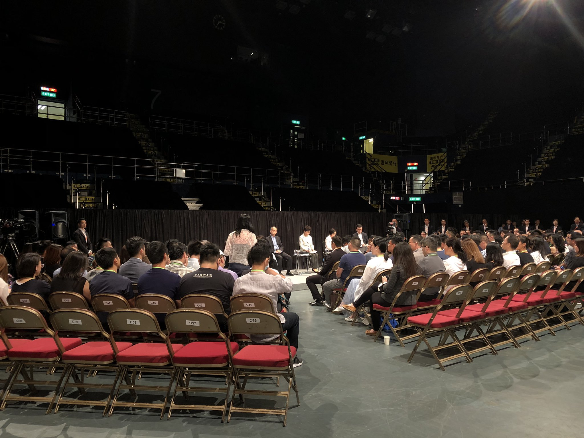 林鄭月娥首場“#社區對話”於9月26日晚舉行